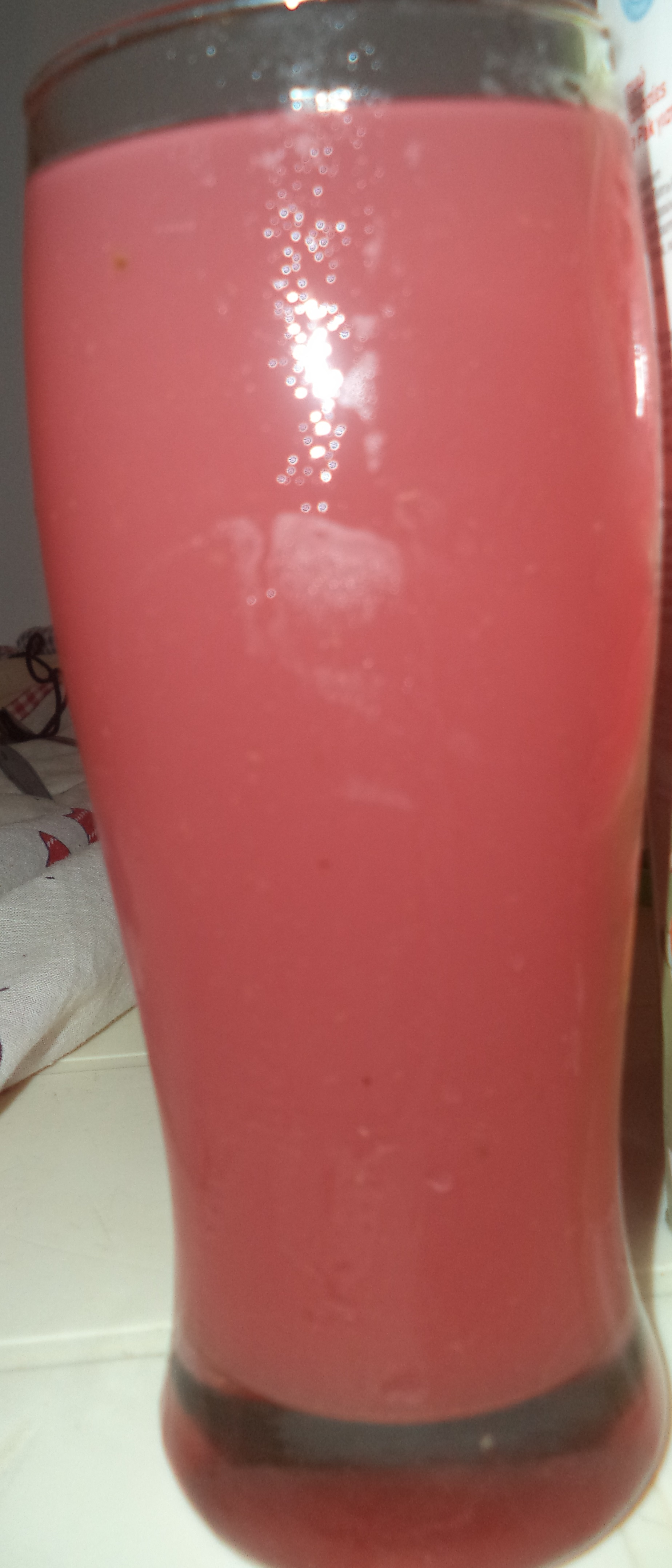 Ένα ποτήρι με χυμό καρπουζιού.